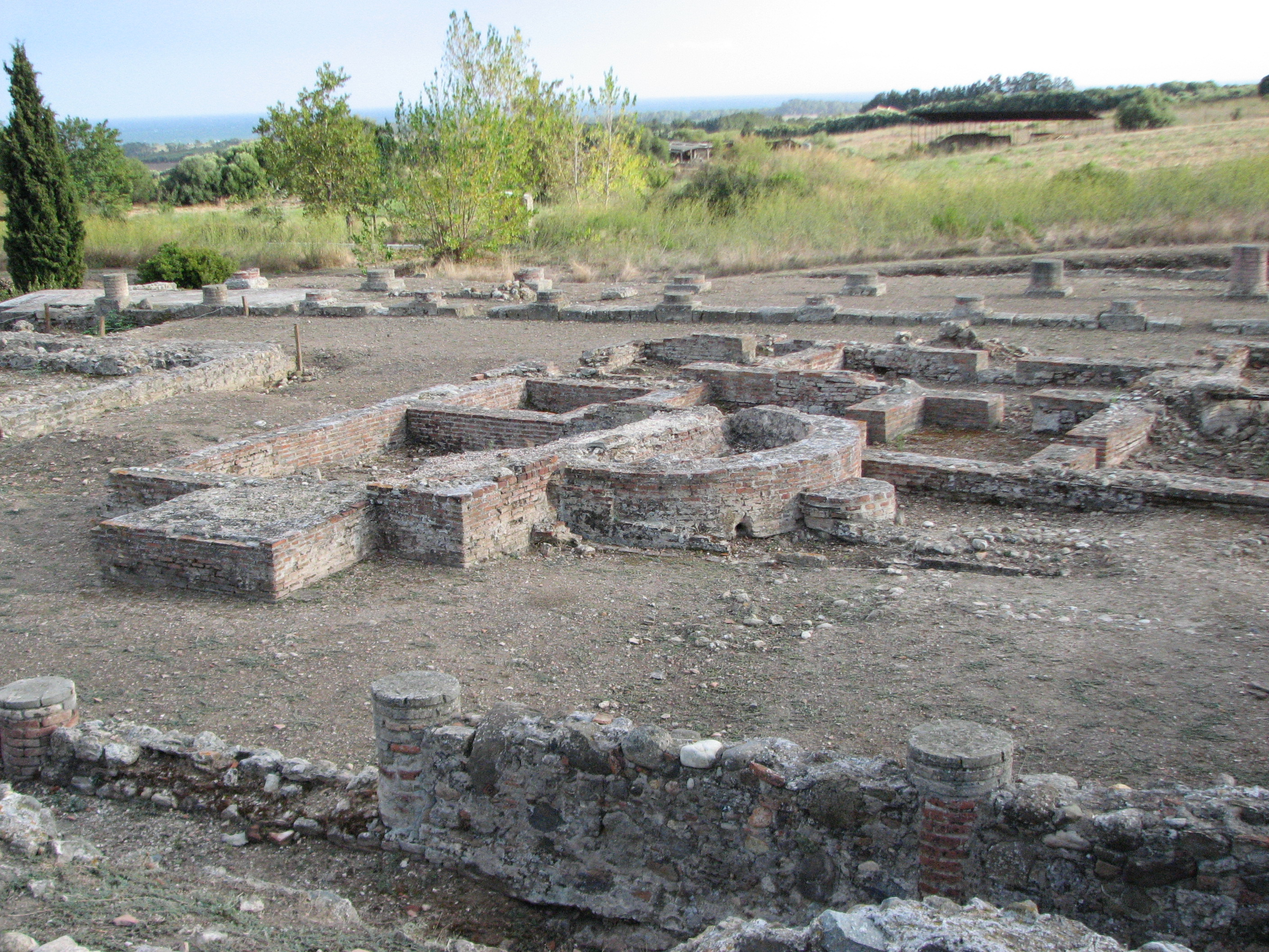 Aleria, glavno mesto rimske province Korzike. Področje Alerie so naseljevali že Etruščani, Grki (Alalia) in Kartažani.